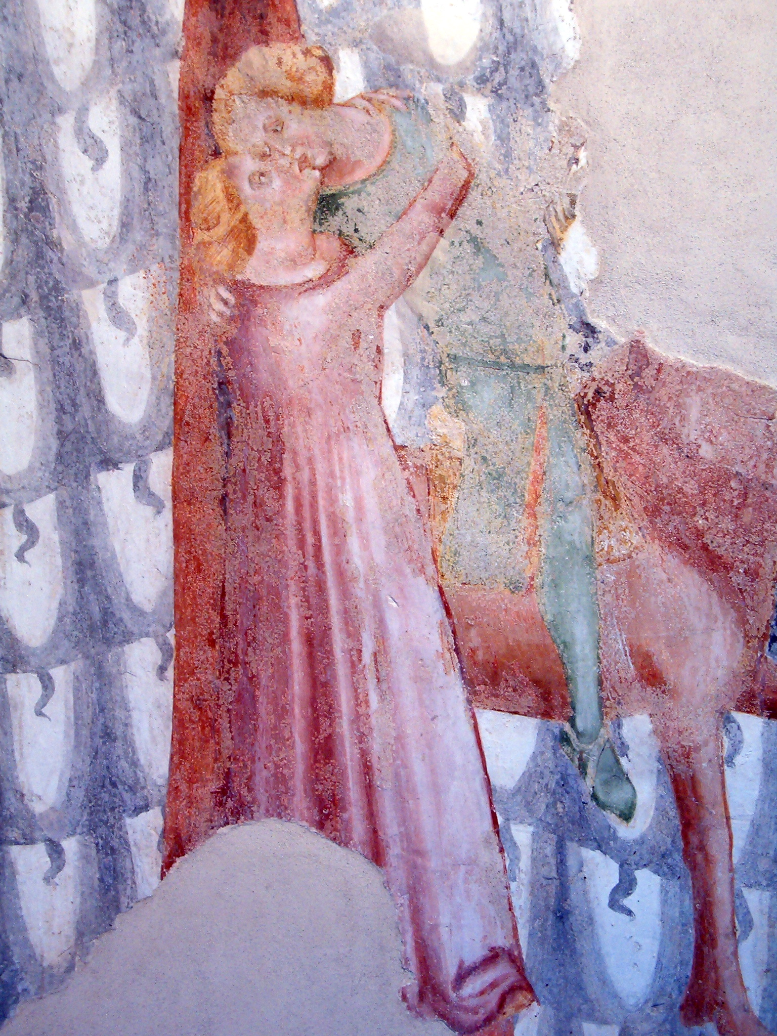 Castello di Avio (Trentino, Italy)